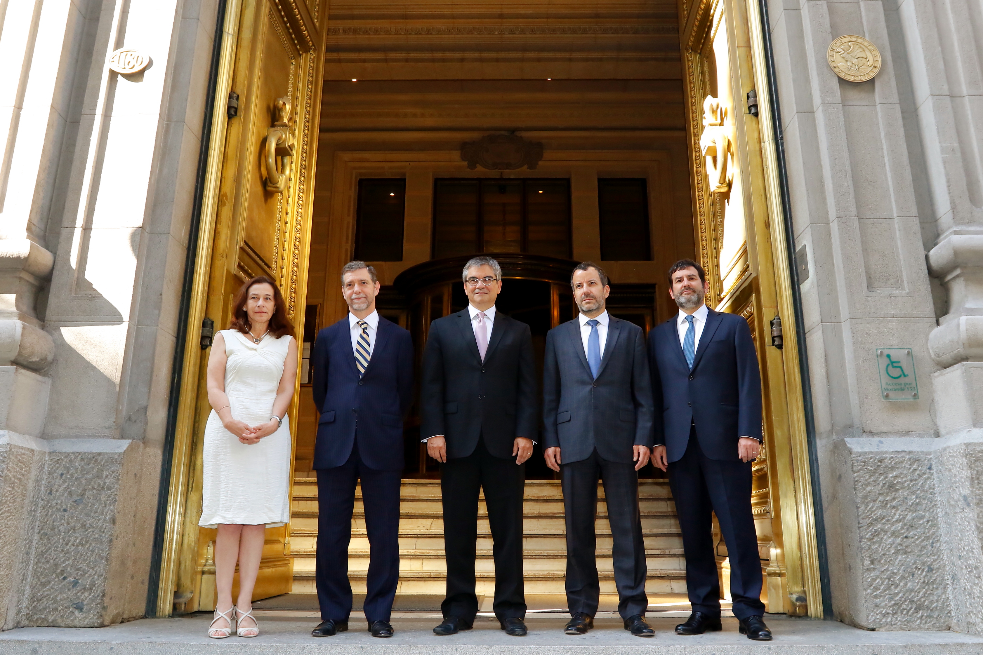 Consejo del Banco Central de Chile. Rosanna Costa, Joaquín Vial, Mario Marcel, Pablo García y Alberto Naudon. Marzo de 2018.